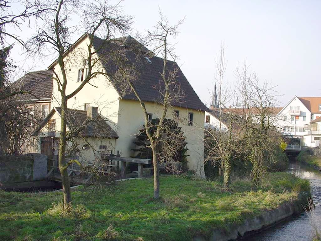 Muehle in Muehlheim am Main